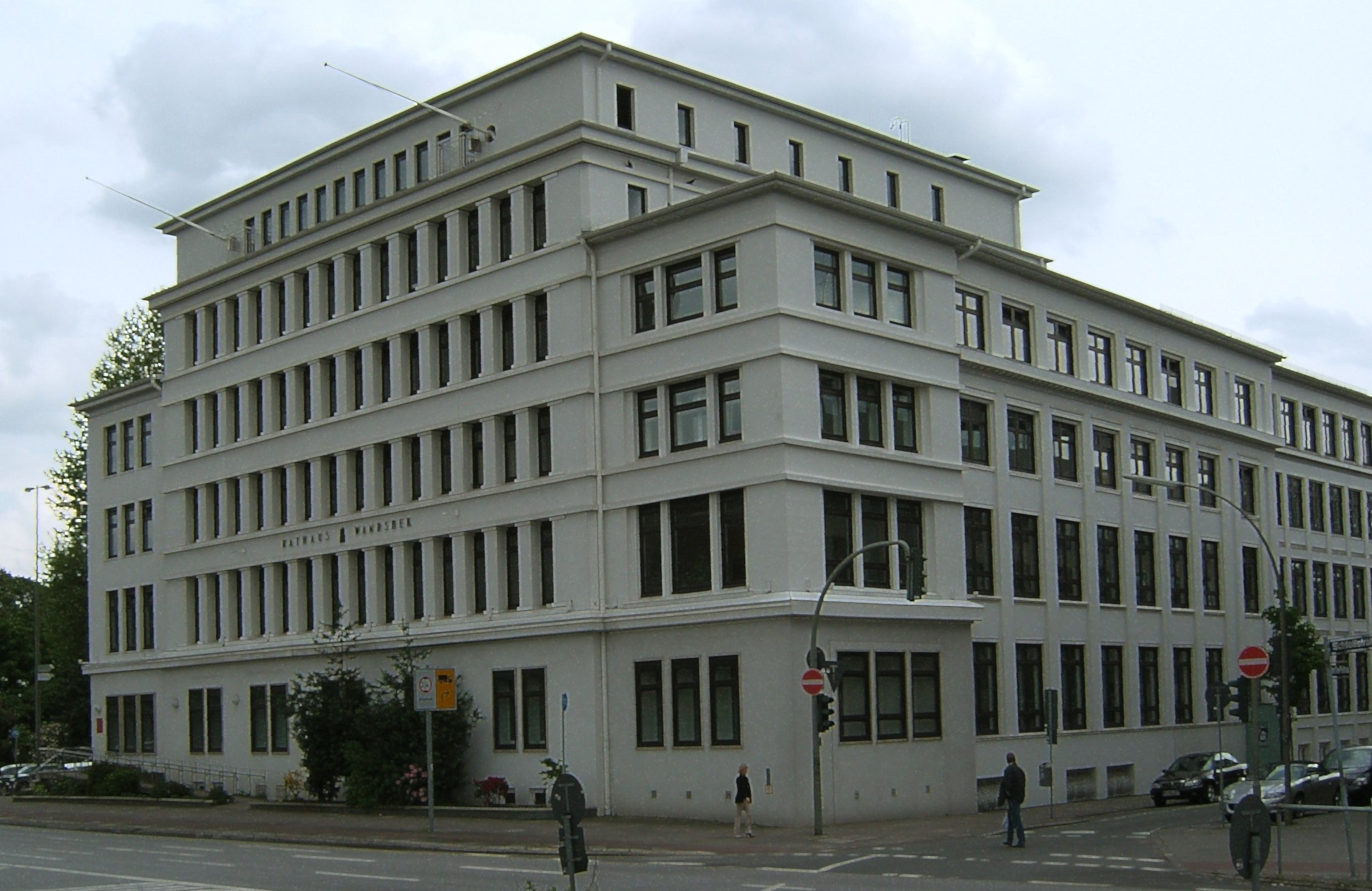 Stormarnhaus in Hamburg-Wandsbek. Ehemaliger Sitz der Verwaltung des Kreises Stormarn, heute Sitz der Wandsbeker Bezirksverwaltung. Das Gebäude wurde 1922/23 von Fritz Höger erbaut.